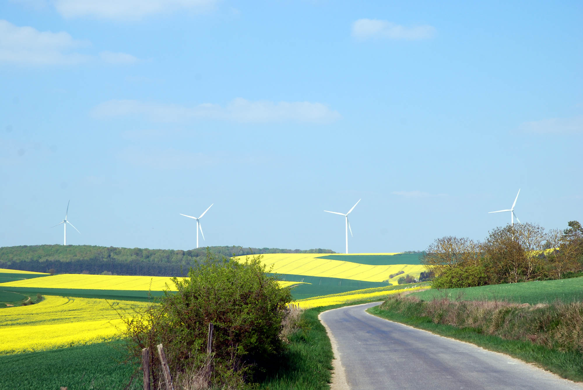 Eoliennes aux Clérimois (Yonne France)